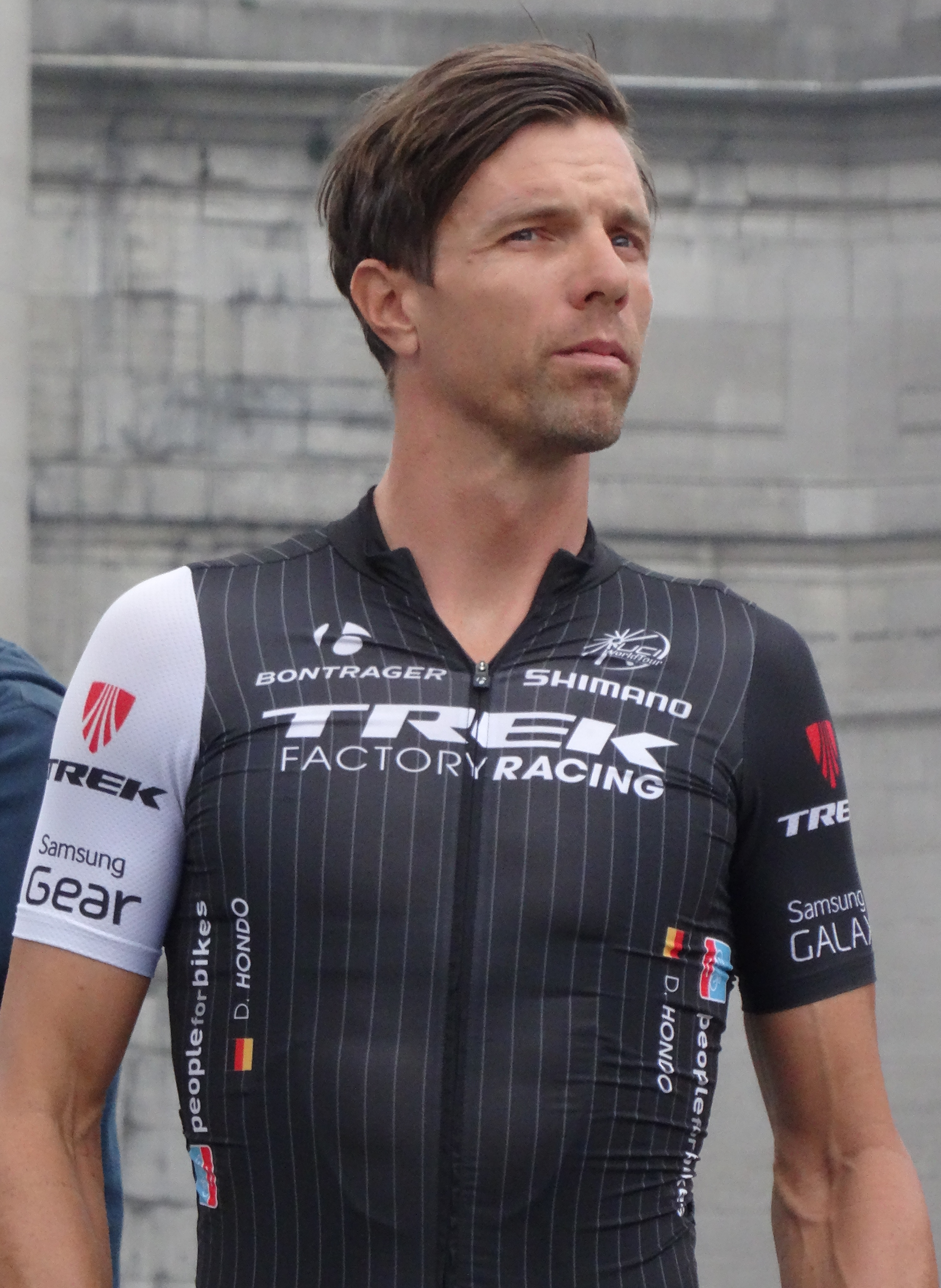 Brussels Cycling Classic 2014.